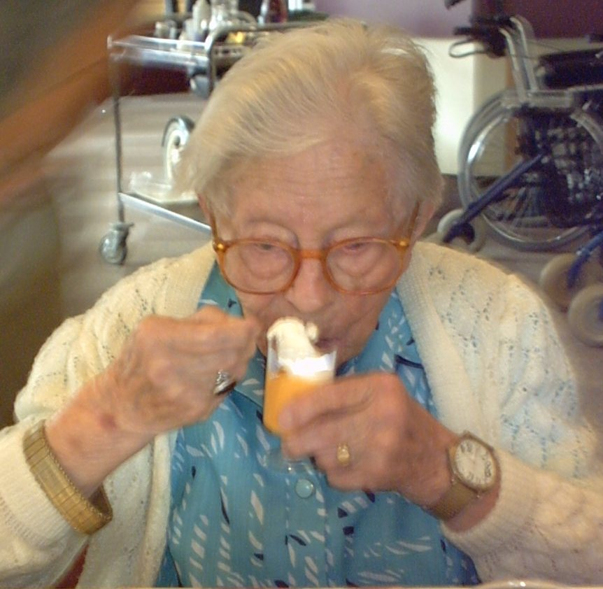 Van Andel-Schipper's 113de verjaardag.